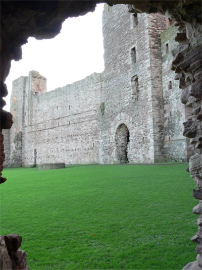 Tantallon Castle, Scotland